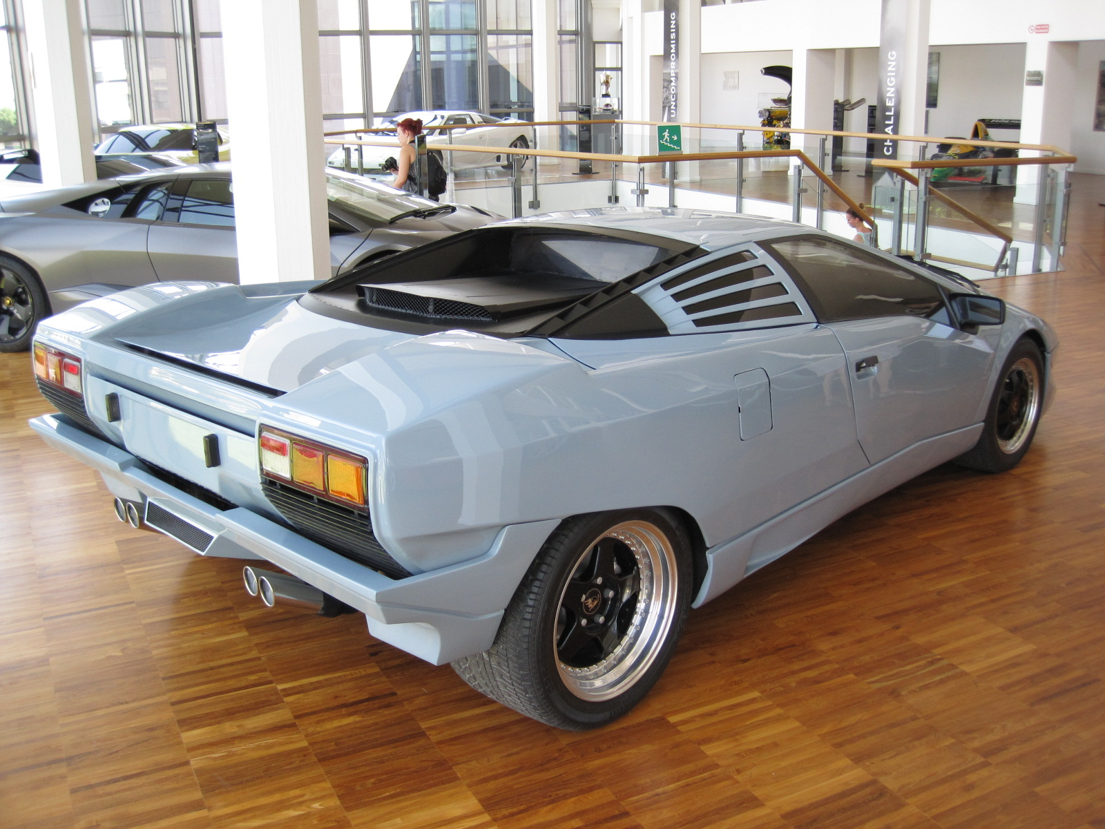 Musée Lamborghini